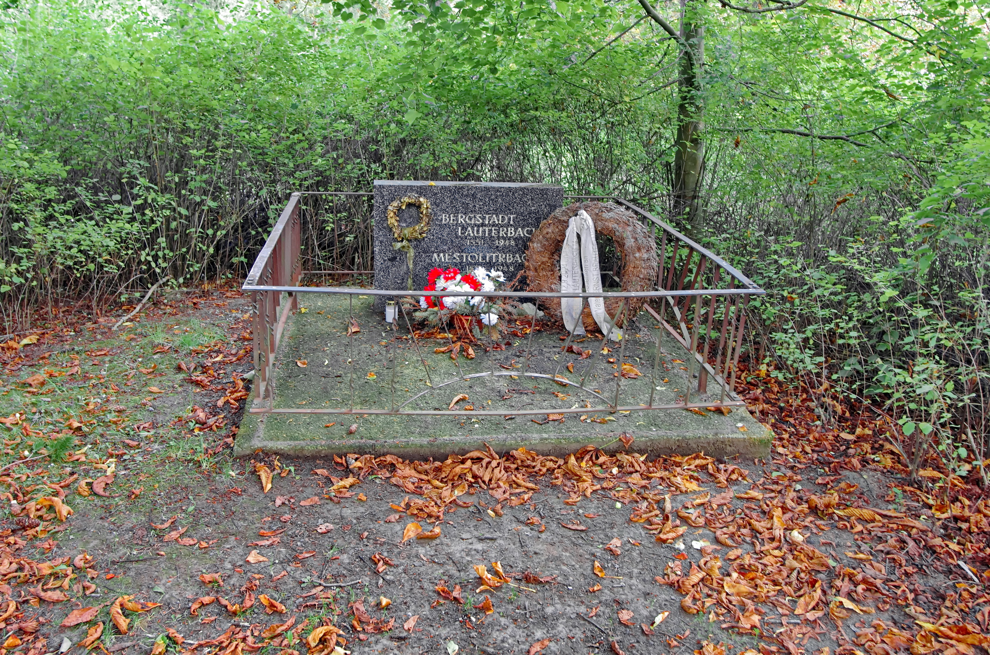 Pomník zaniklé (zničené) obce Čistá (město Čistá, Litrbachy), Slavkovský les, okres Sokolov